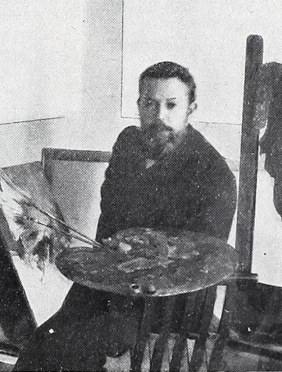 Tomás Muñoz y Lucena.